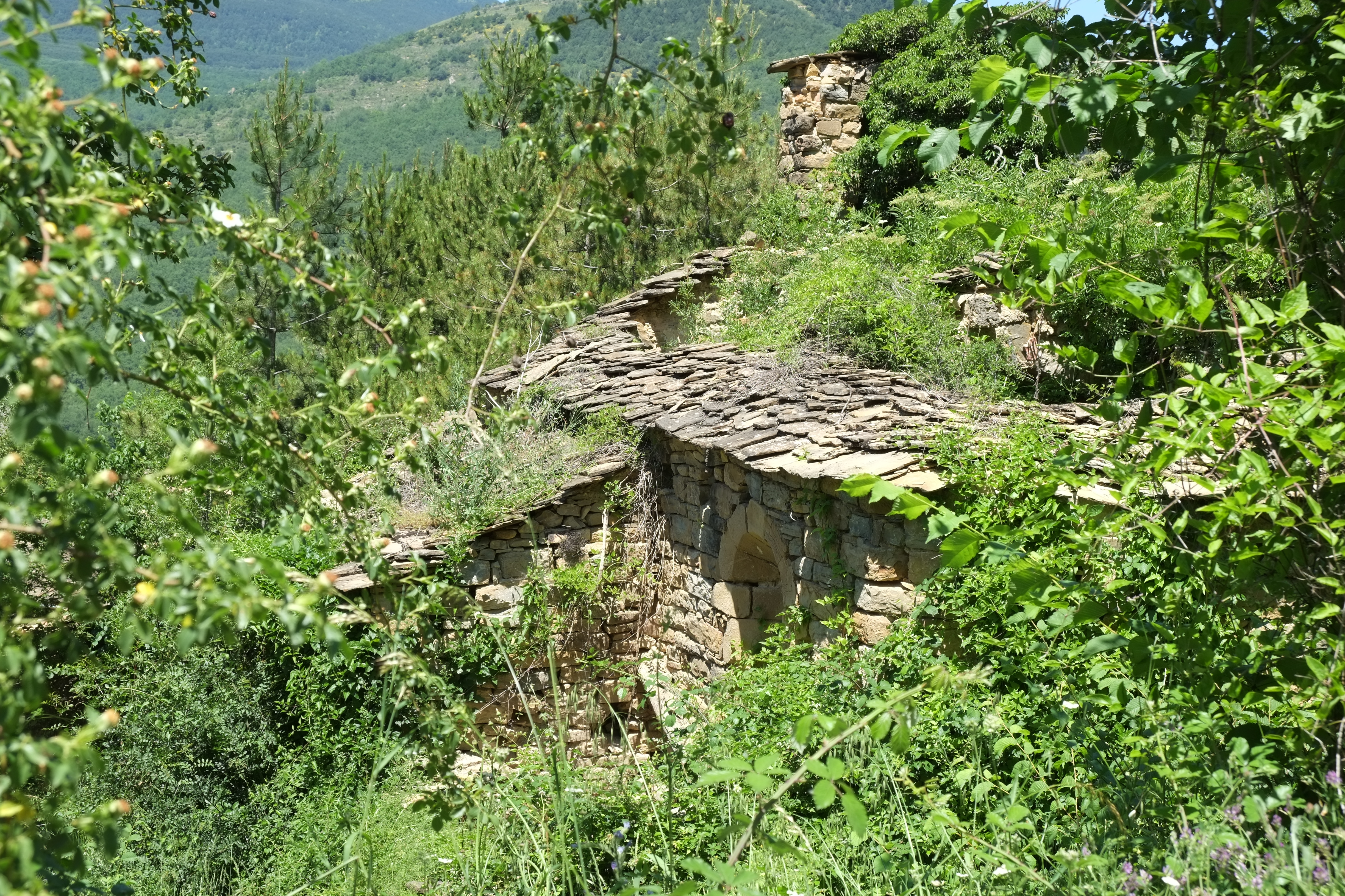 Kirche in Morens in Aragonien (Spanien)